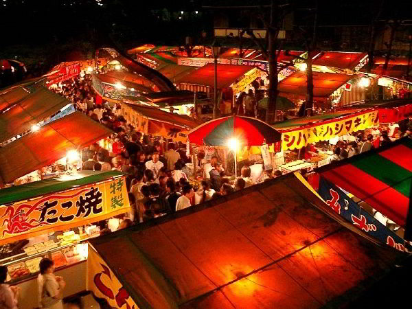 lễ hội mùa hè